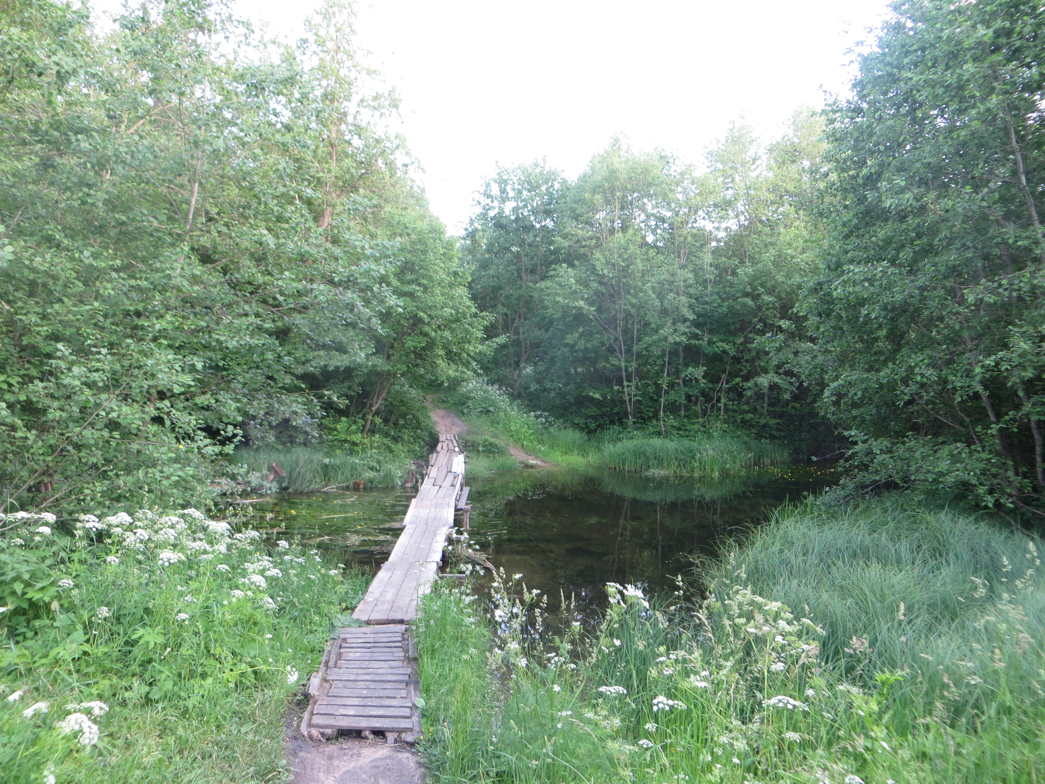 Парк 'Орлова роща': между парком "Зверинец", р. Теплая (Гатчинка) и Красносельским шоссе, Гатчина, Гатчинский район, Ленинградская область